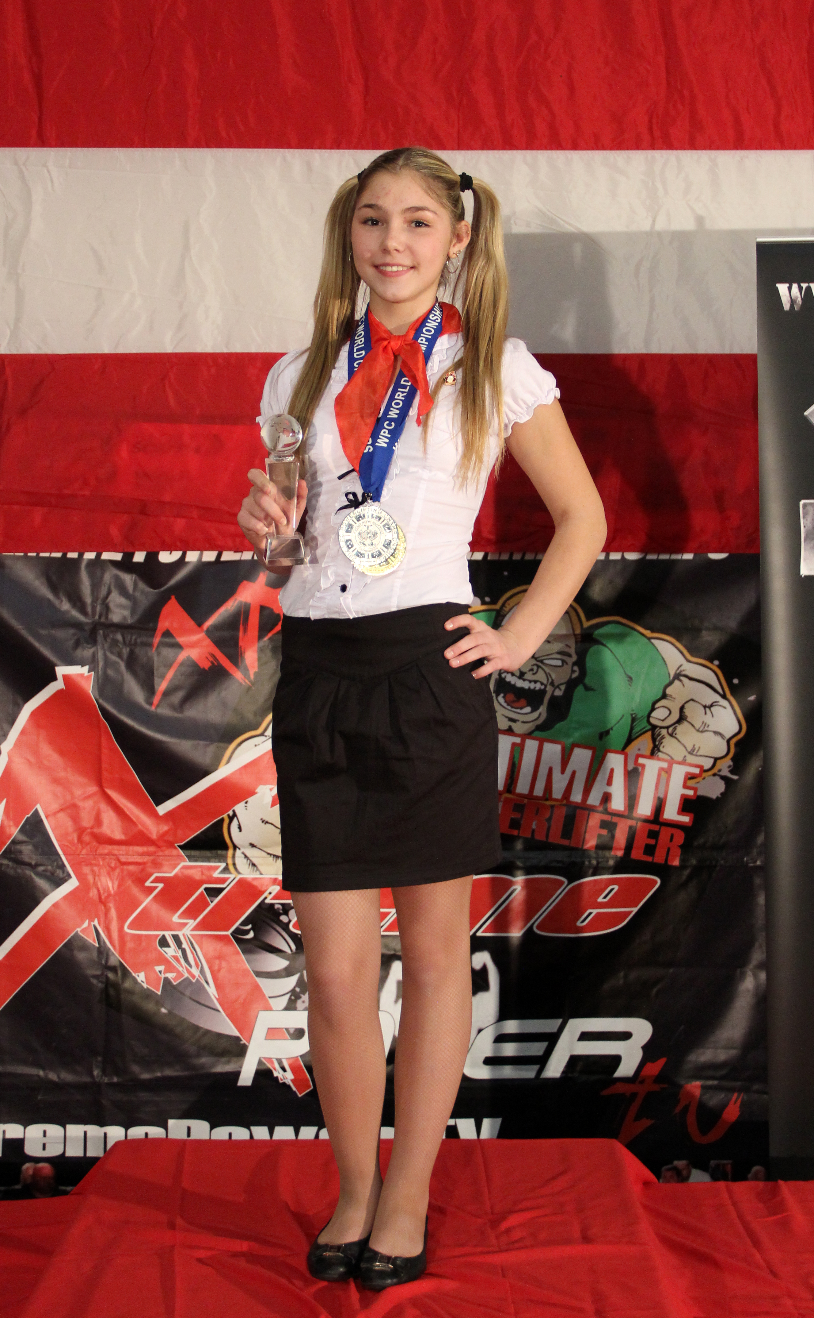 Марьяна Наумова, чемпионка Мира в жиме штанги лежа 2011-2012, Абсолютная рекордсменка Мира в жиме штанги лежа среди девушек-тинейджеров, первая девушка до 18 лет, выполнившая норматив Элита России в жиме штанги лежа и попавшая на обложку крупнейшего в Мире журнала по пауэрлифтингу "Powerlifting USA". Марьяна - член пионерской организации имени В.И. Ленина. На награждении на чемпионате Мира по пауэрлифтингу и жиму штанги лежа федерации WPC, проходившему 6 ноября 2012 года в Лас-Вегасе, США, Марьяна вышла в пионерской форме.